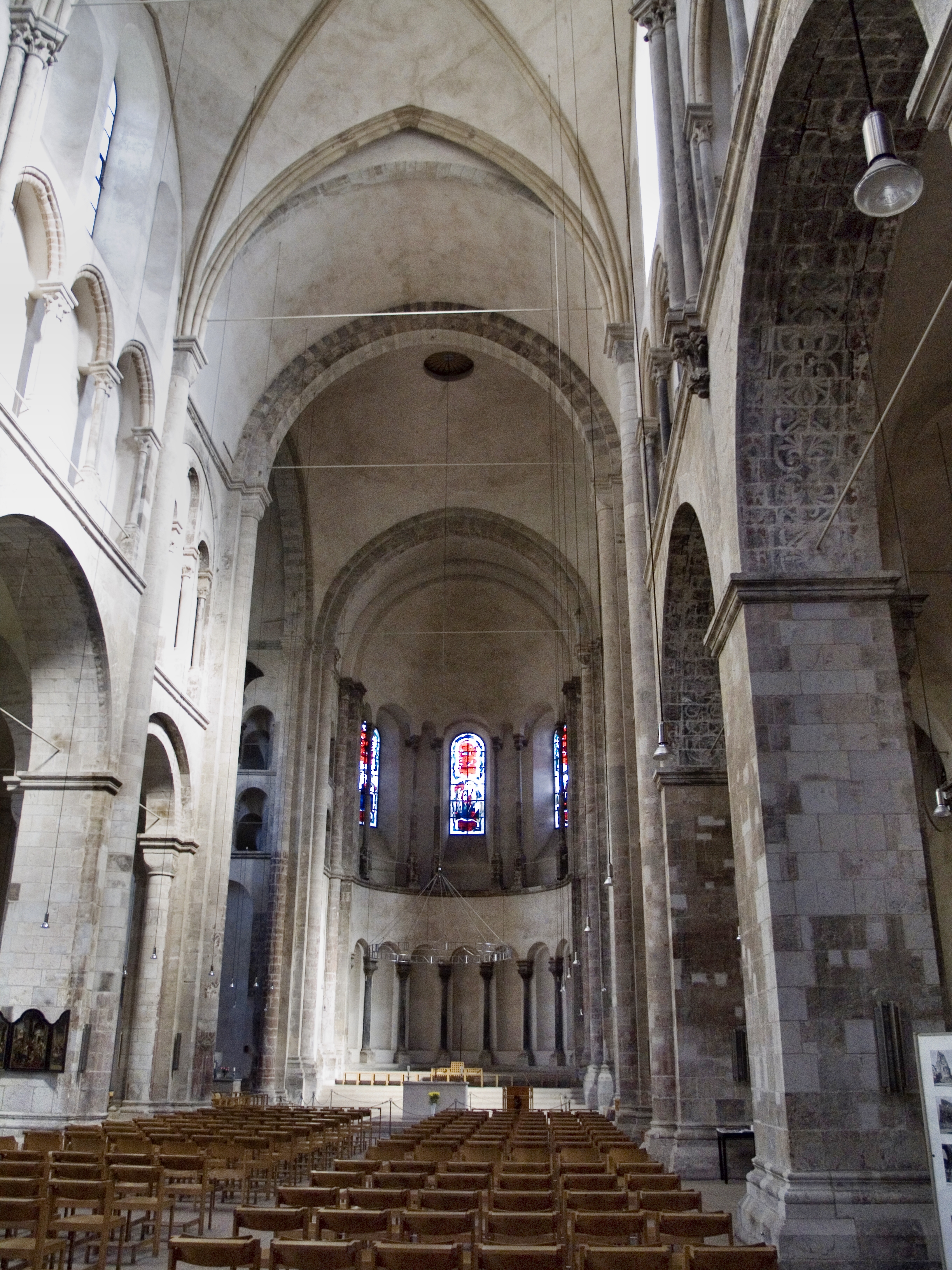 Северный Рейн-Вестфалия - Большой Святой Мартин